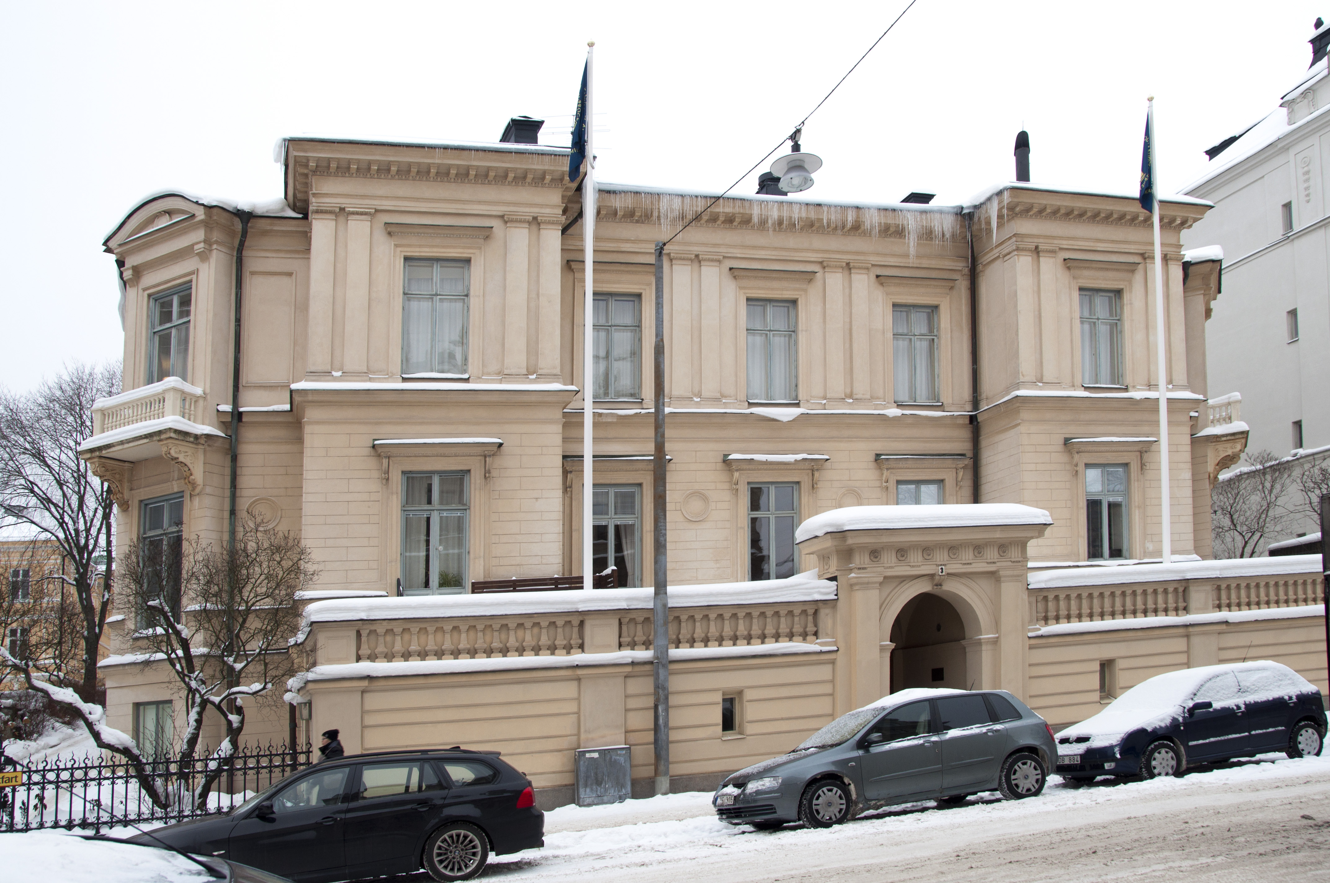 Villagatan 3. Byggnadsår 1878-79, arkitekter och byggherrar Axel & Hjalmar Kumlien, byggmästare A G Söderlund.